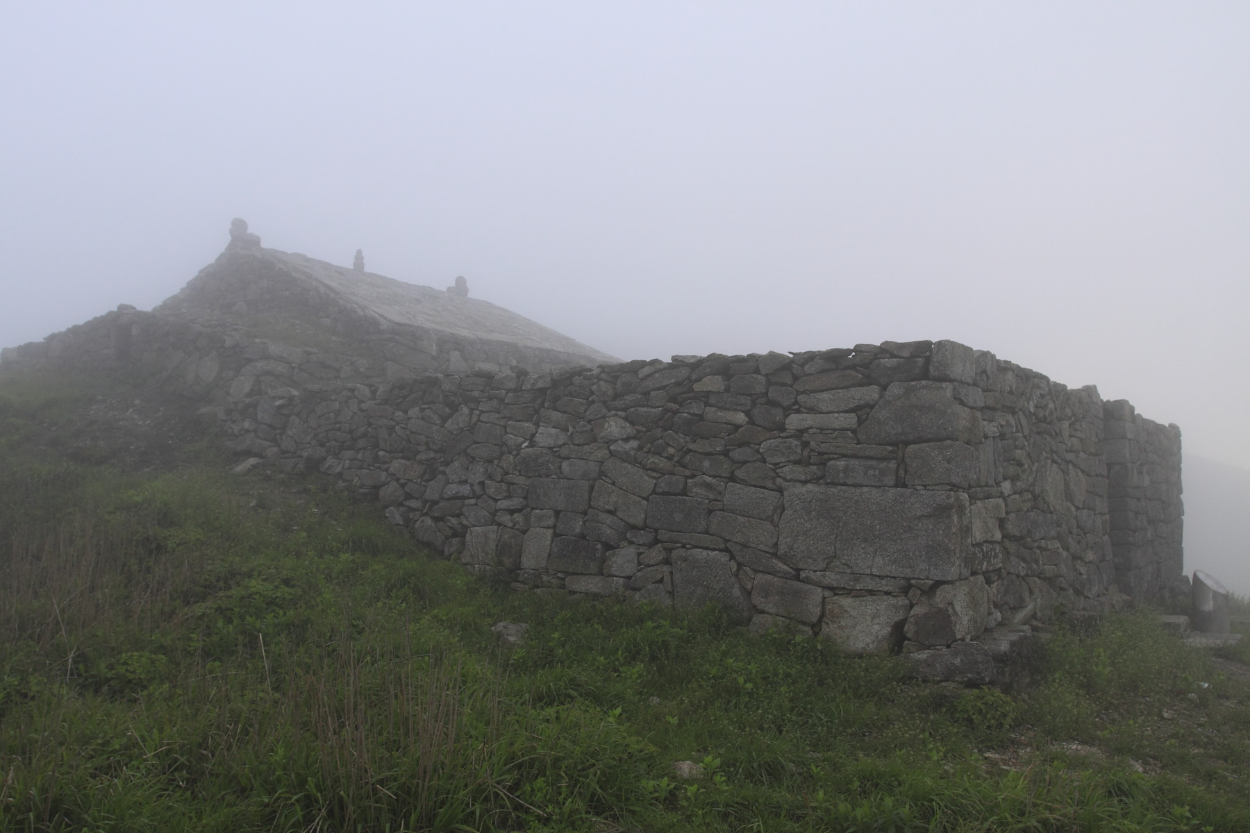 江西武功山祭祀遗址（汪仙坛，或称望仙坛），江西省文物保护单位